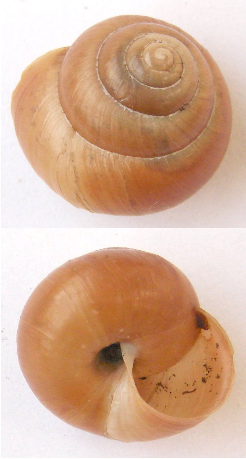 Bradybaena fruticum